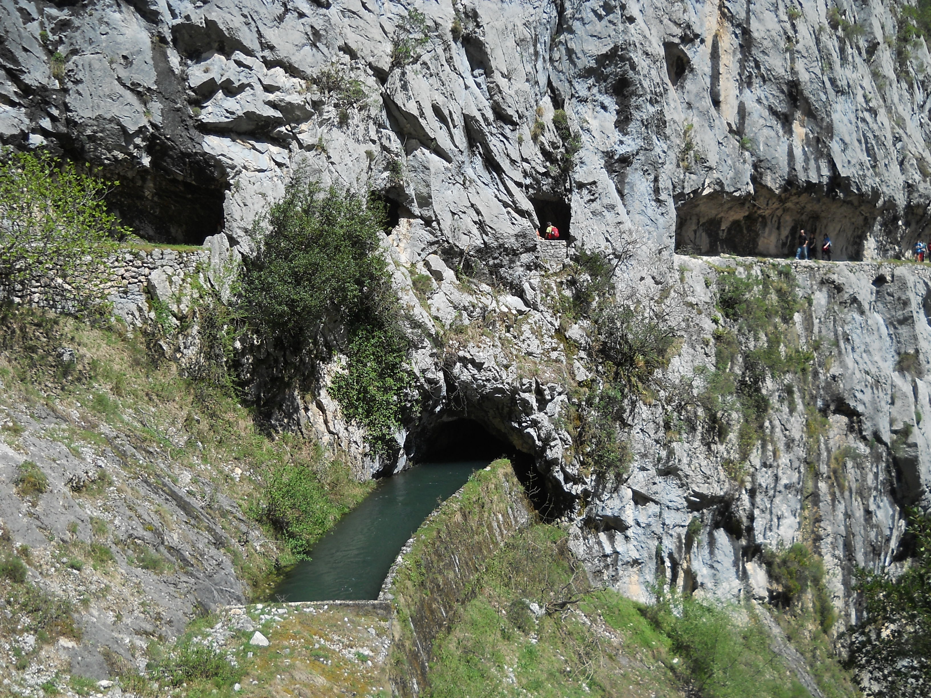 Gola e sentiero del Cares, Parco Nazionale dei Picos de Europa, Asturie/León, Spagna